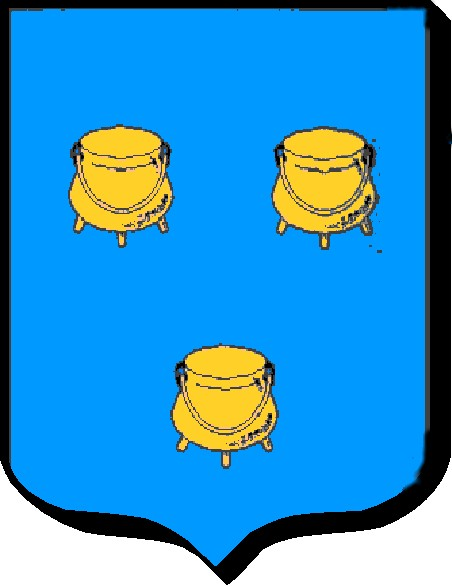 Coat of Arms Louville-la-Chenard, Famille d'Allonville Chartres